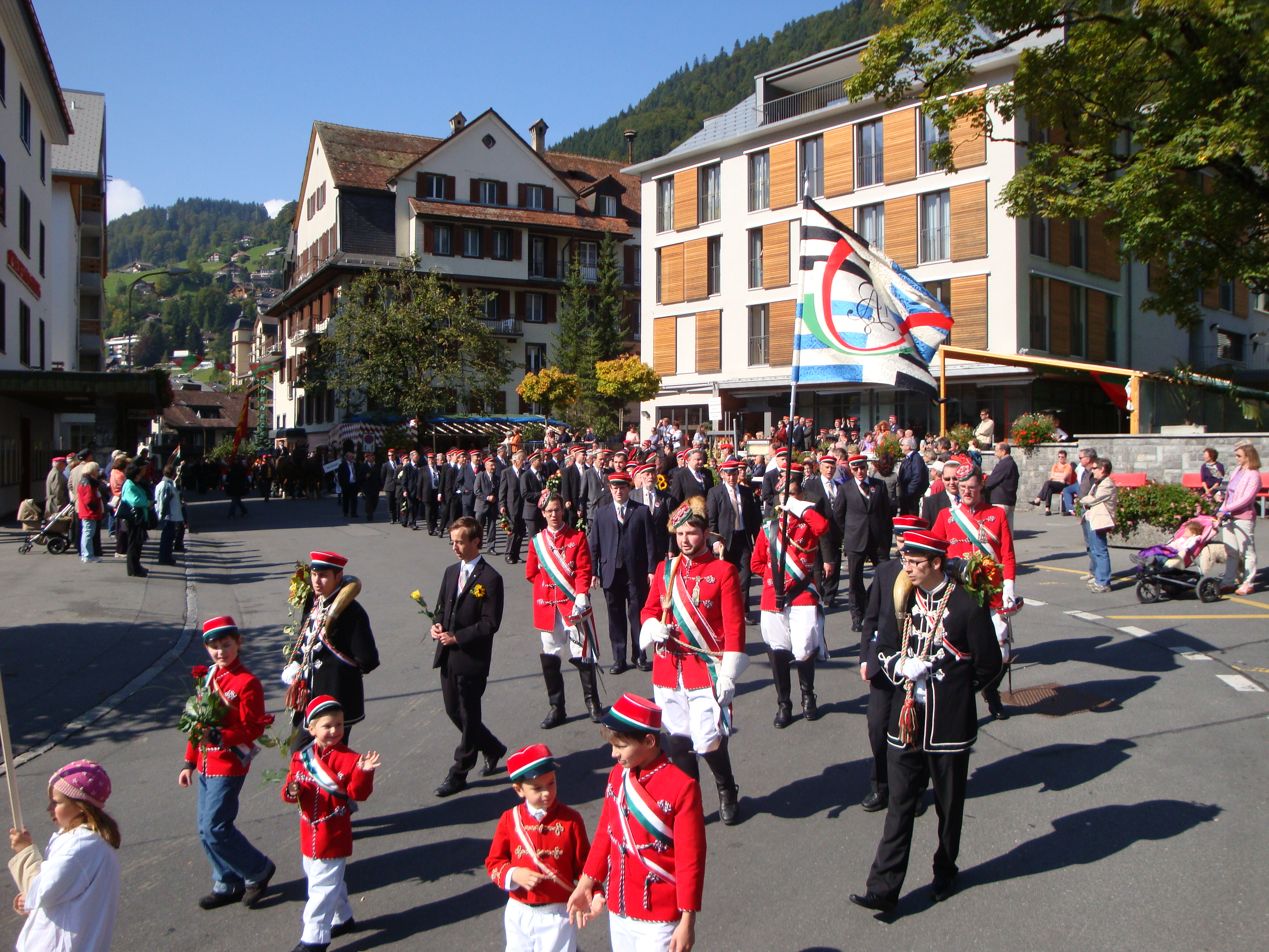 Die AKV Alemannia beim chargieren